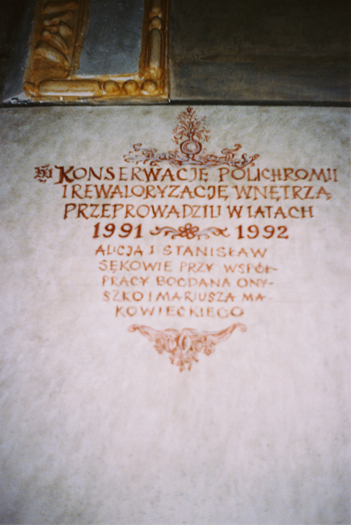 wnętrze kamienicy Gruszewiczów